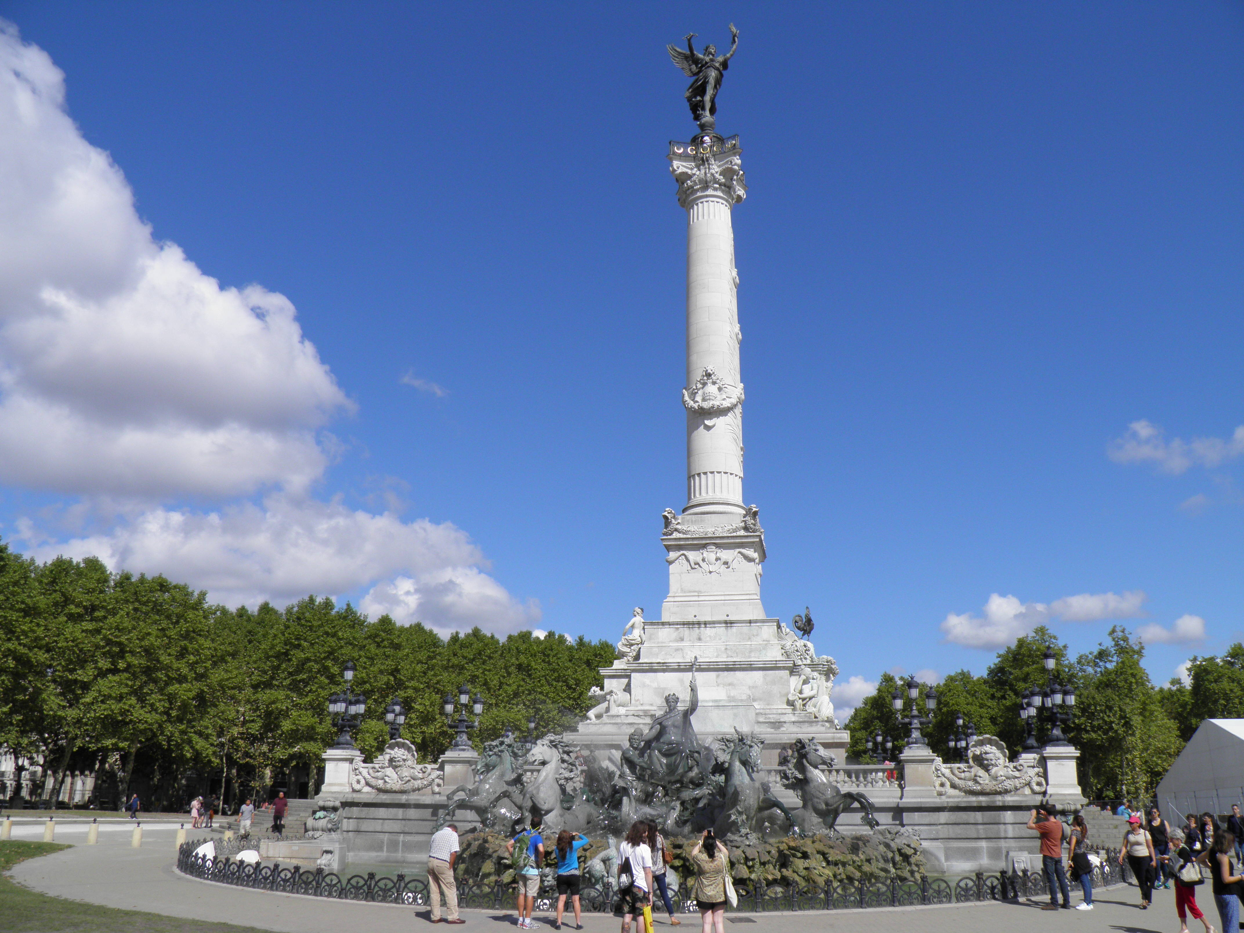 Monument au Girondins à Bordeaux (Gironde, France).